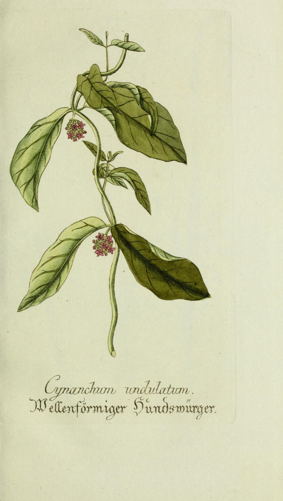 L^jtojiclTum, latttulahcni ,.